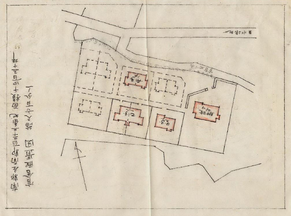 中文（台灣）: 南郭的官舍群建於1920年代，由彰化郡守與彰化郡職員使用。